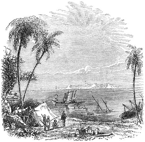 Manila Bay, early 1800s. Original caption: Baie de Manille. From Aventures d'un Gentilhomme Breton aux iles Philippines by Paul de la Gironiere, published in 1855.